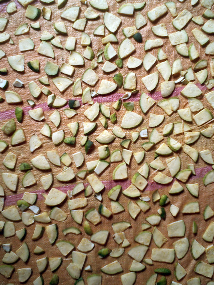 Dry young pumkin.